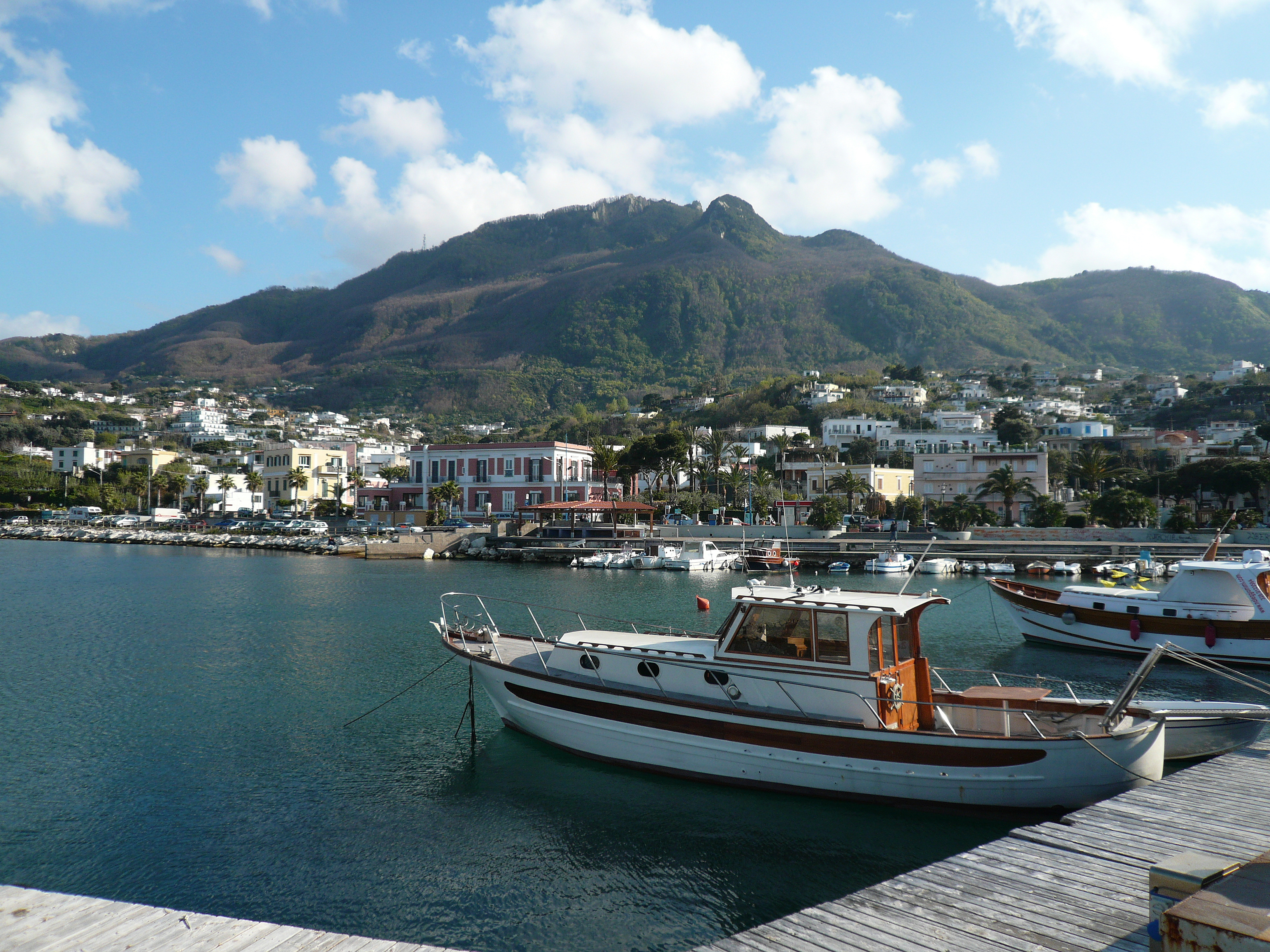 il lungomare di Lacco Ameno (isola d'Ischia) visto dal porticciolo turistico. Autore foto: Roberto De Martino